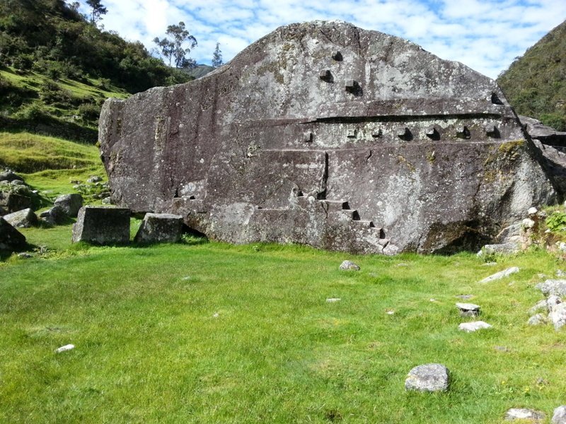 Ñusta Hisp'ana oder Yurak Rumi